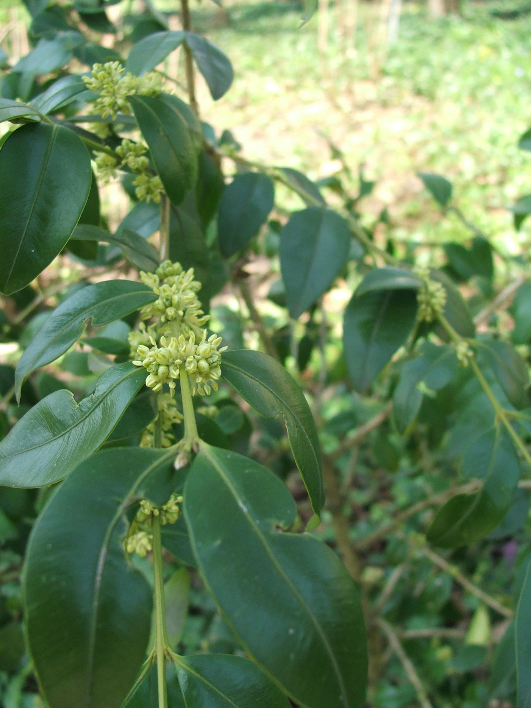 Buxus henryi - MTA Botanic Garden, Hungary